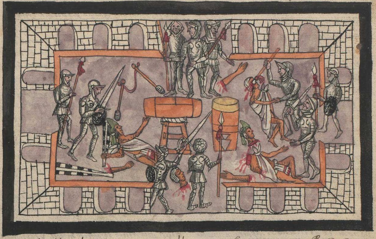 Imagen del códice durán donde se logra ver la masacre del templo Mayor